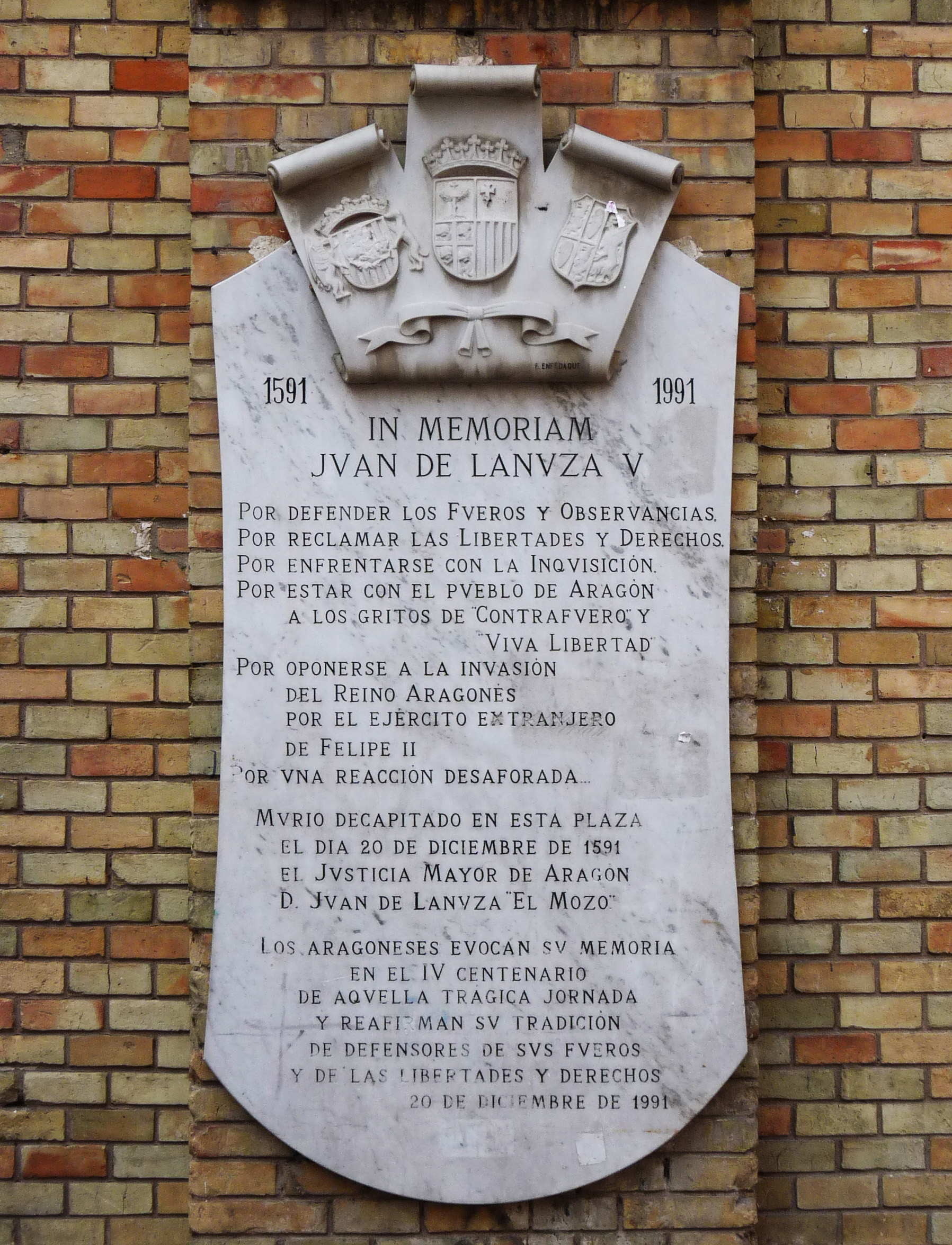 Zaragoza - Mercado Central - Placa dedicada a Juan de Lanuza en el lugar de su ejecución: «1591 - 1991. In memoriam Jvan de Lanvza V. Por defender los fueros y observancias. Por reclamar las libertades y derechos. Por enfrentarse con la inquisición. Por estar con el pueblo de Aragón a los gritos de contrafuero y viva libertad. Por oponerse a la invasión del Reino Aragonés por el ejército extranjero de Felipe II. Por una reacción desaforada... Murió decapitado en esta plaza el día 20 de diciembre de 1591 el Justicia Mayor de Aragón D. Juan de Lanuza el Mozo. Los aragoneses evocan su memoria en el IV centenario de aquella trágica jornada y reafirman su tradición de defensores de sus fueros y de las libertades y derechos. 20 de diciembre de 1991»